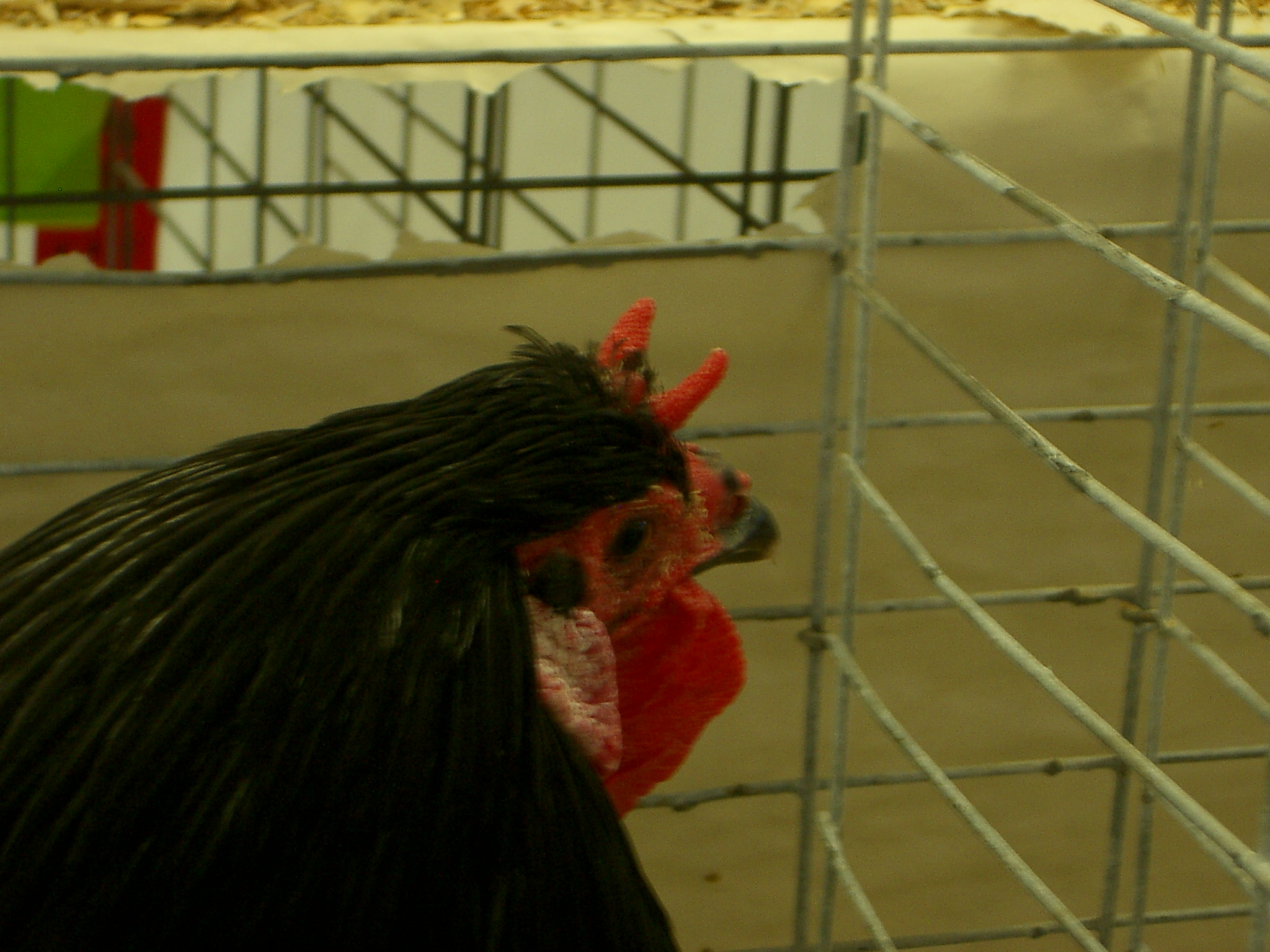 A La Flèche chicken.